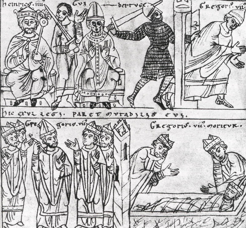 Investiturstriden, illustration från medeltida handskrift (a 1150). Antipope Clement III (center) with Emperor Henry IV. The enthronement of Henry IV and Clement III, and the flight and death of Gregory VII.